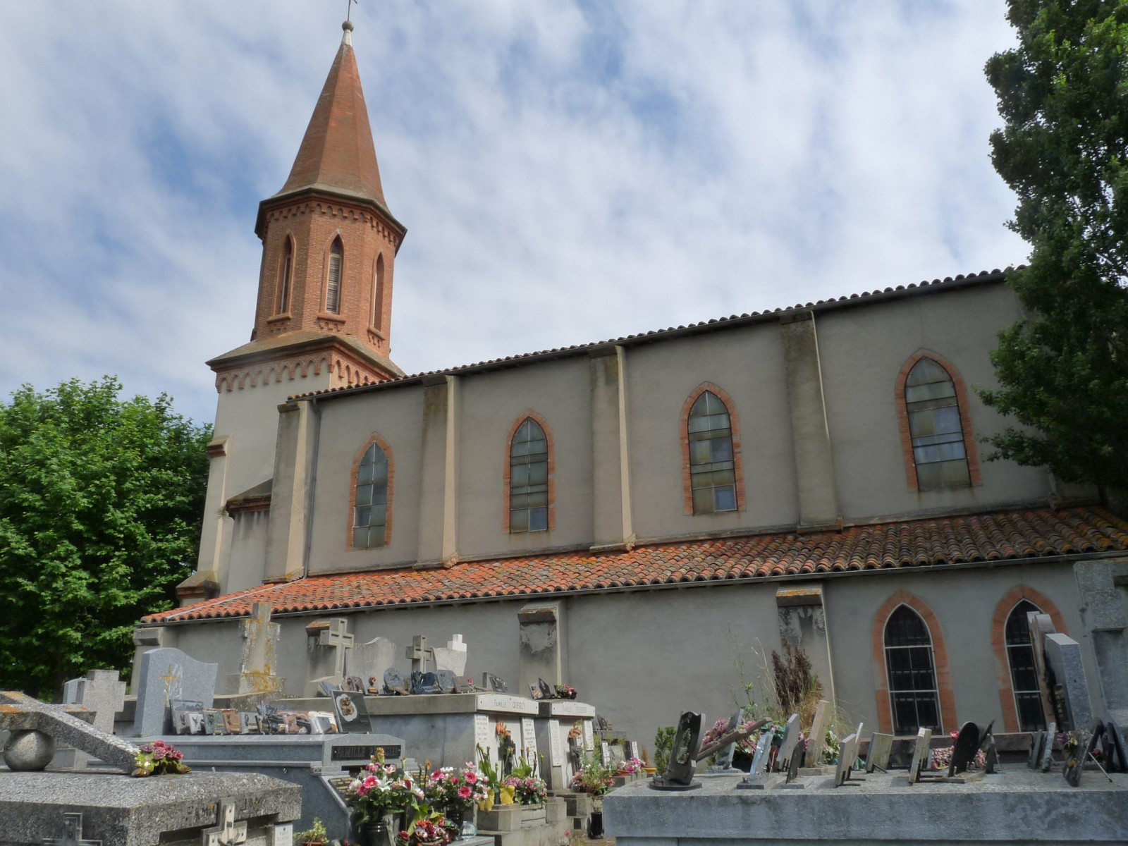 Eglise de Maureville, Haute-Garonne, France